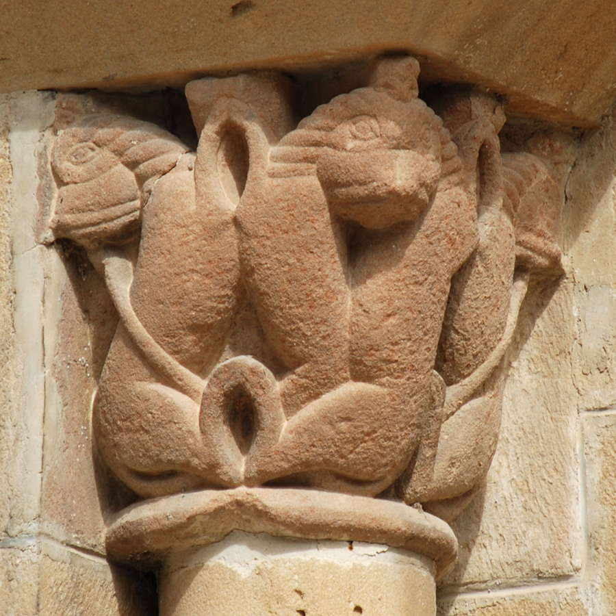 Capitel romanico cilleria pamplona